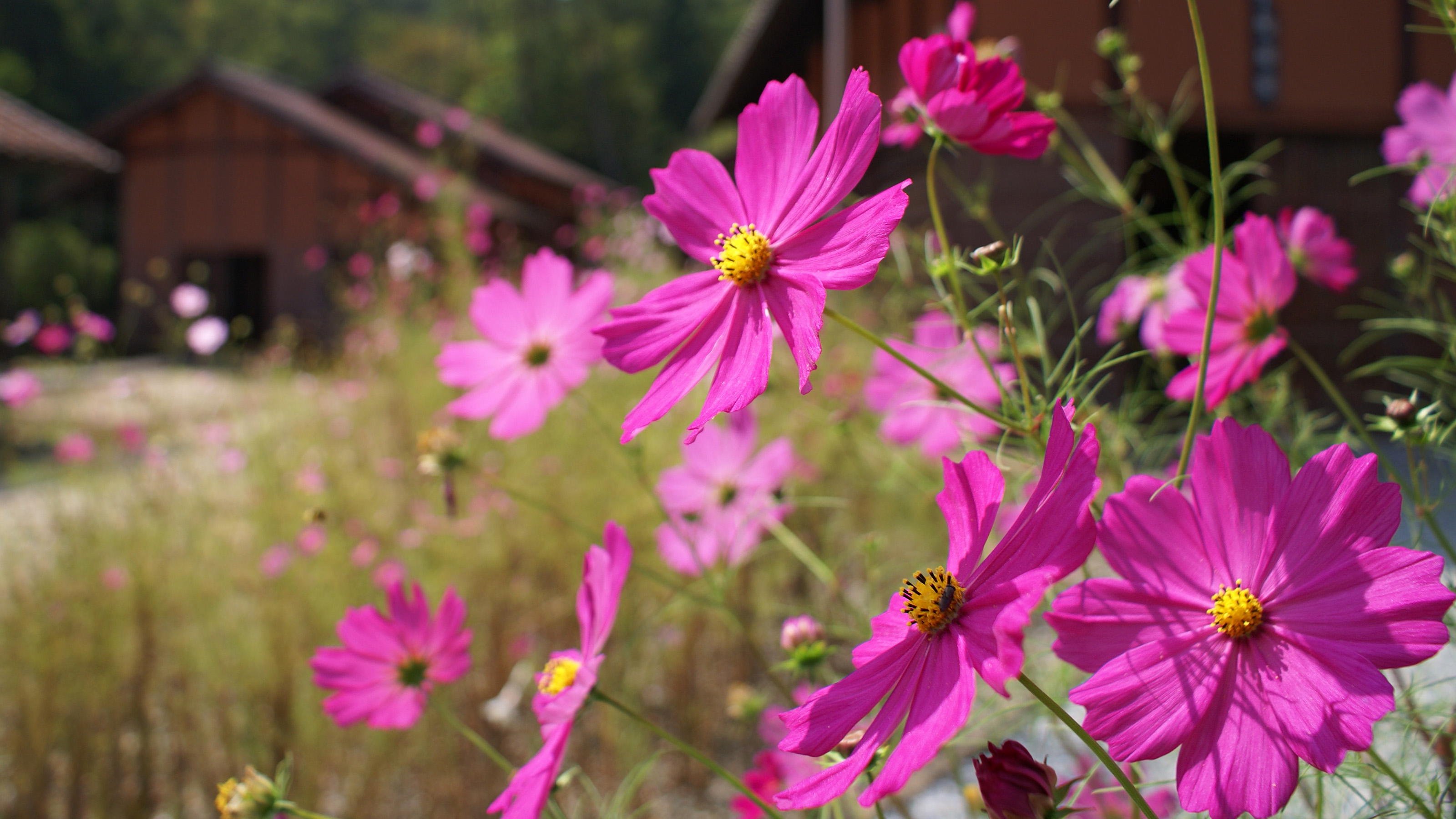 Cosmos at Fukiya, Takahashi, Okayama, Japan